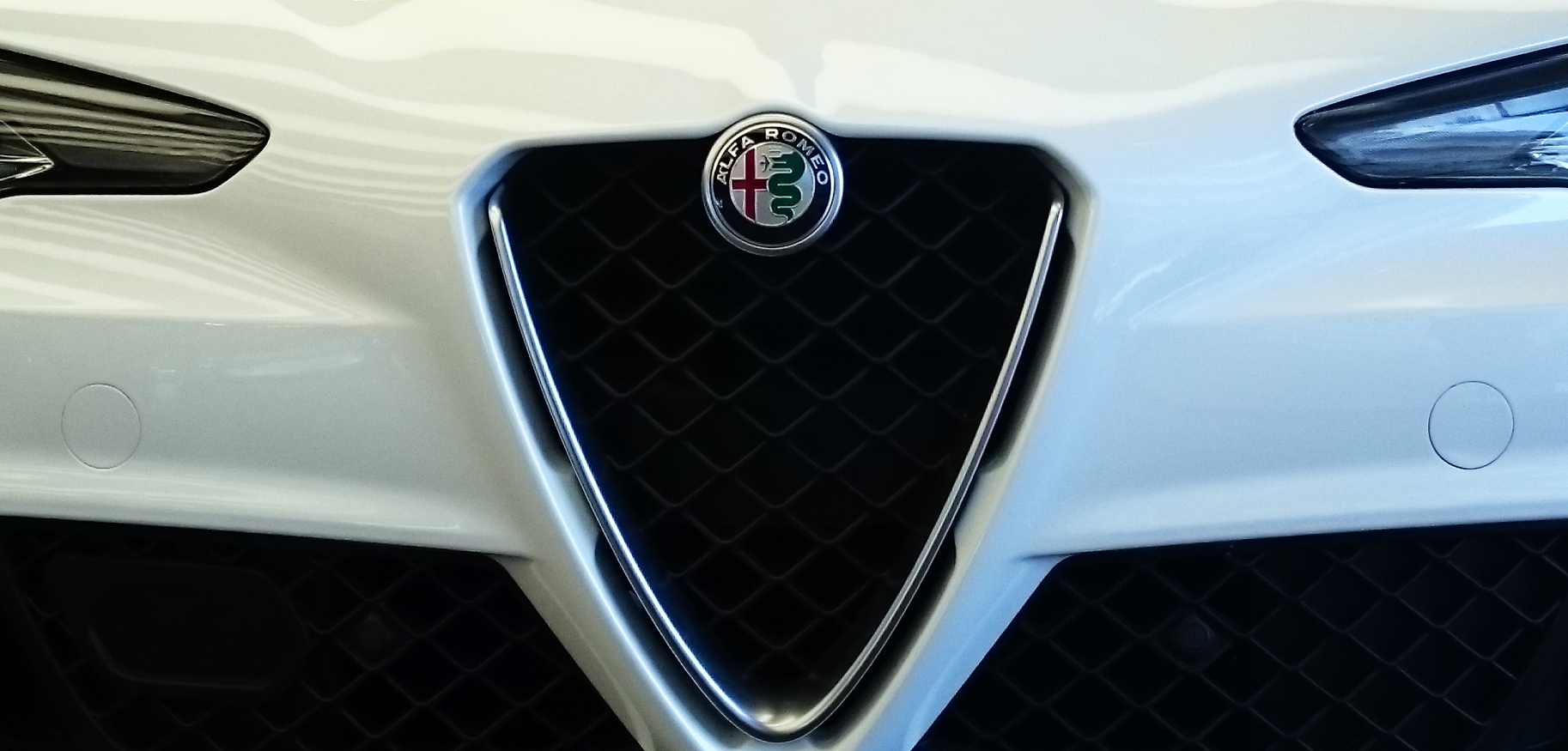 Un modello pre-serie (fatto a mano) della Alfa Romeo Giulia 2015 esposto in anteprima mondiale al rinnovato Museo Alfa Romeo di Arese in occasione dei 105 anni del marchio